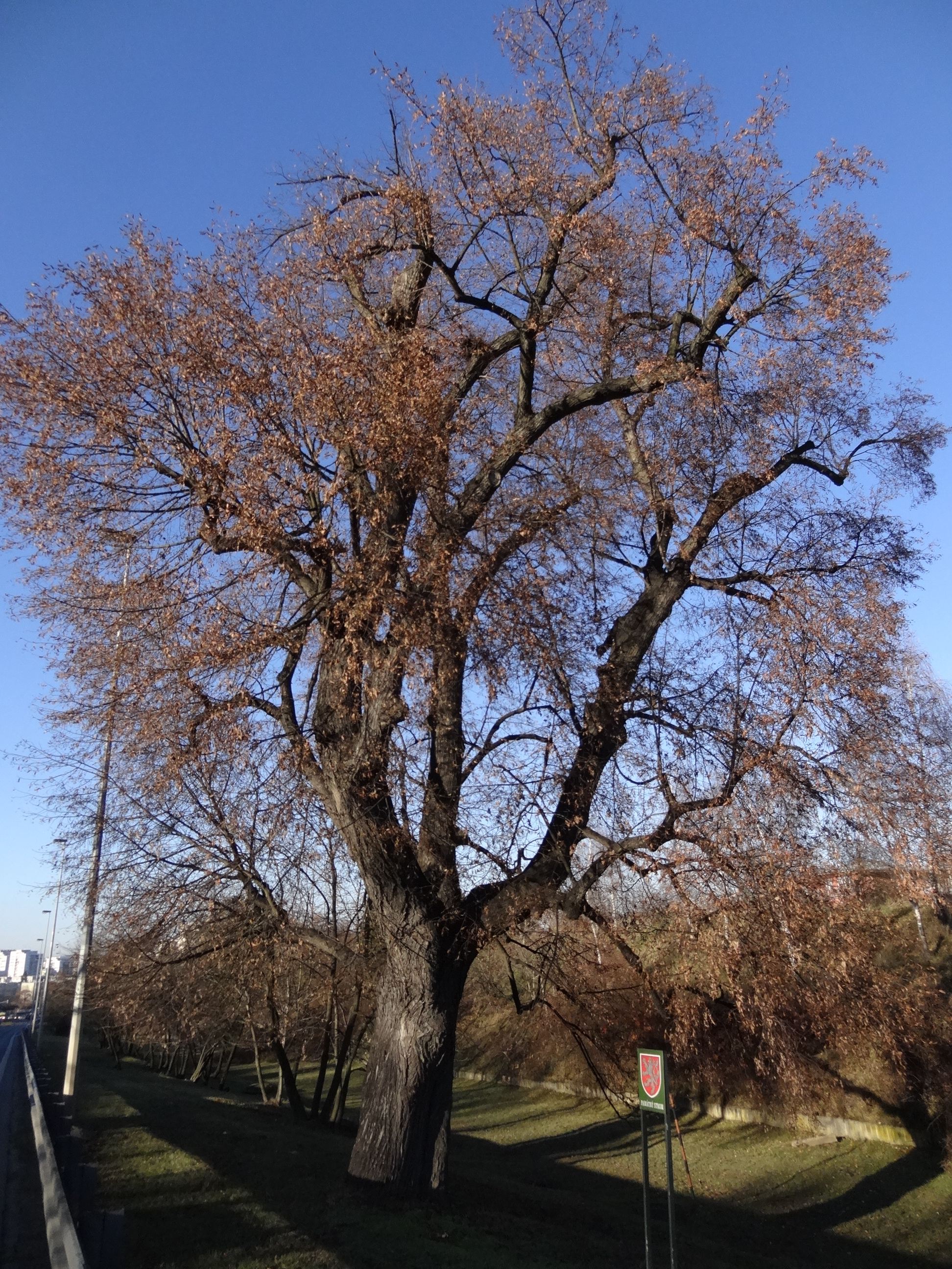 Krč - památná lípa srdčitá na Vídeňské